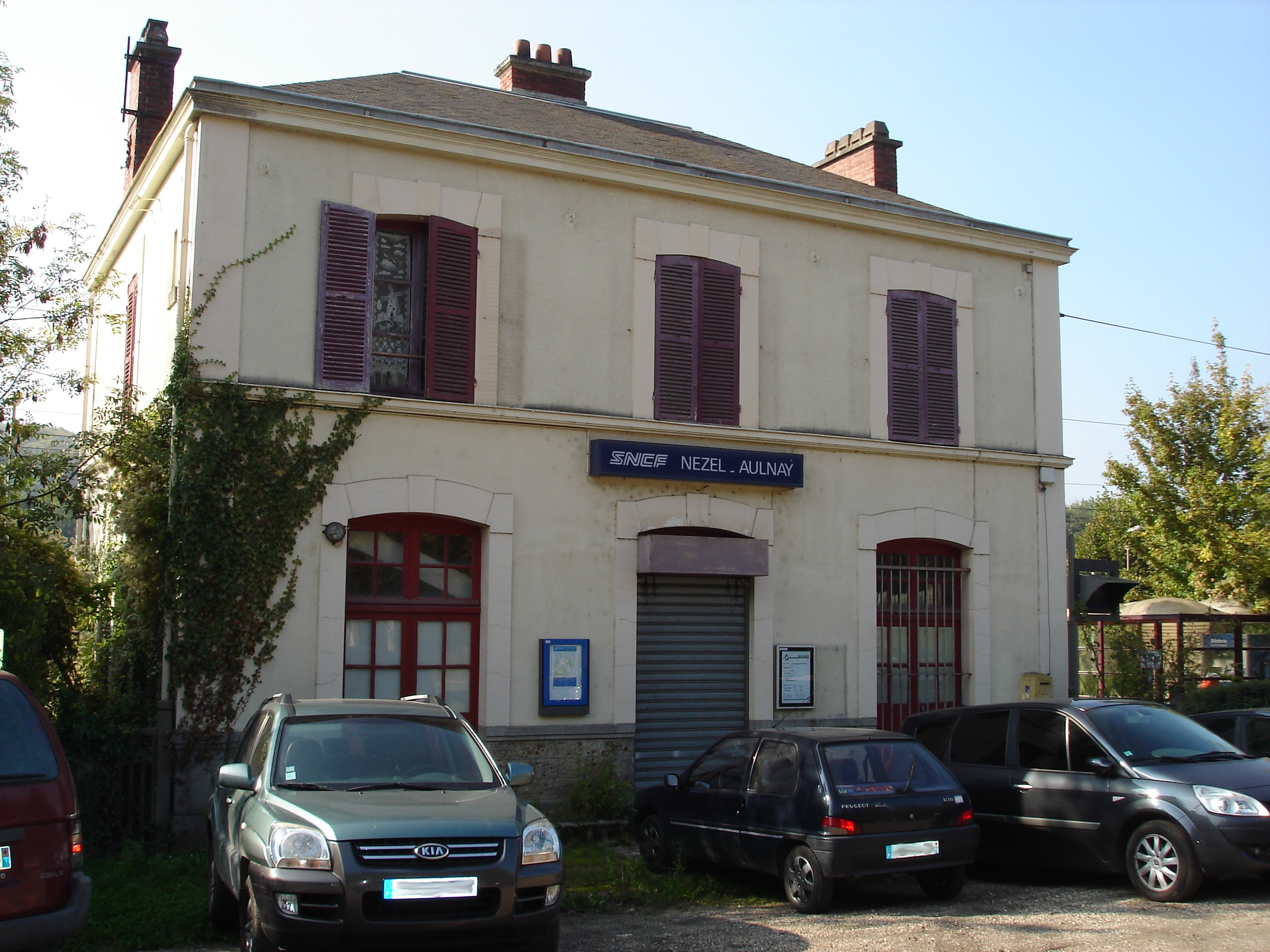 Gare de Nézel - Aulnay (78) : Le bâtiment voyageurs.